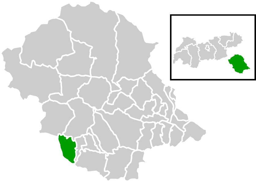 Lage der Gemeinde innerhalb des Bezirks Lienz